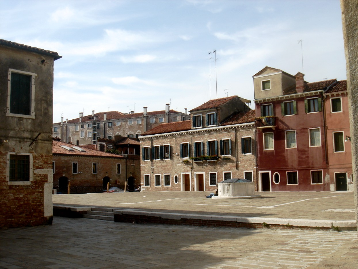 Venezia: veduta di Campo San Trovaso dall'angolo tra le due facciate della chiesa.